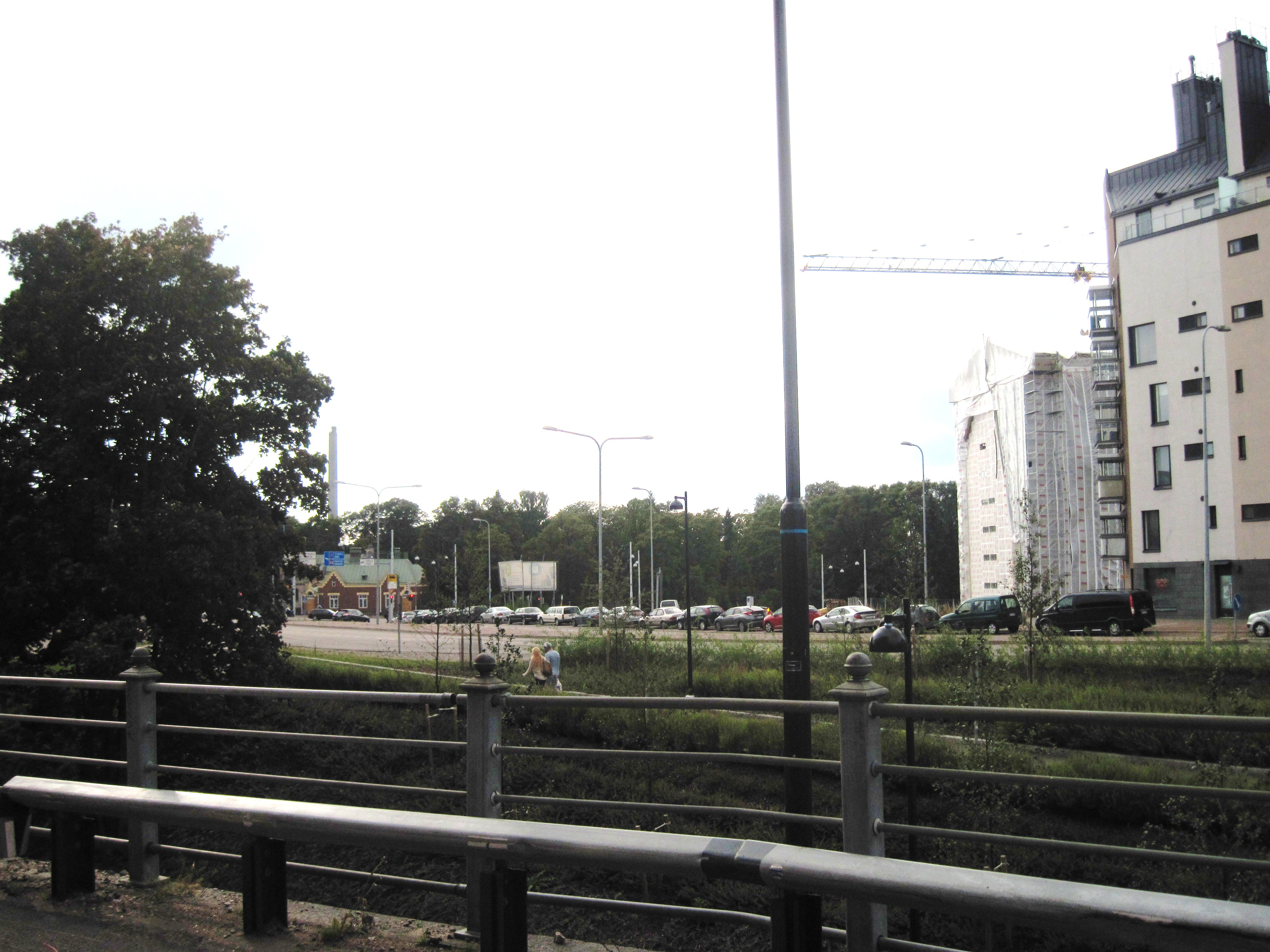 Leppäsuo, Helsinki, seen from East